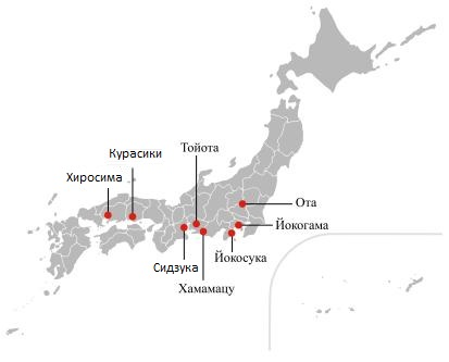 Центры автомобилестроения Японии